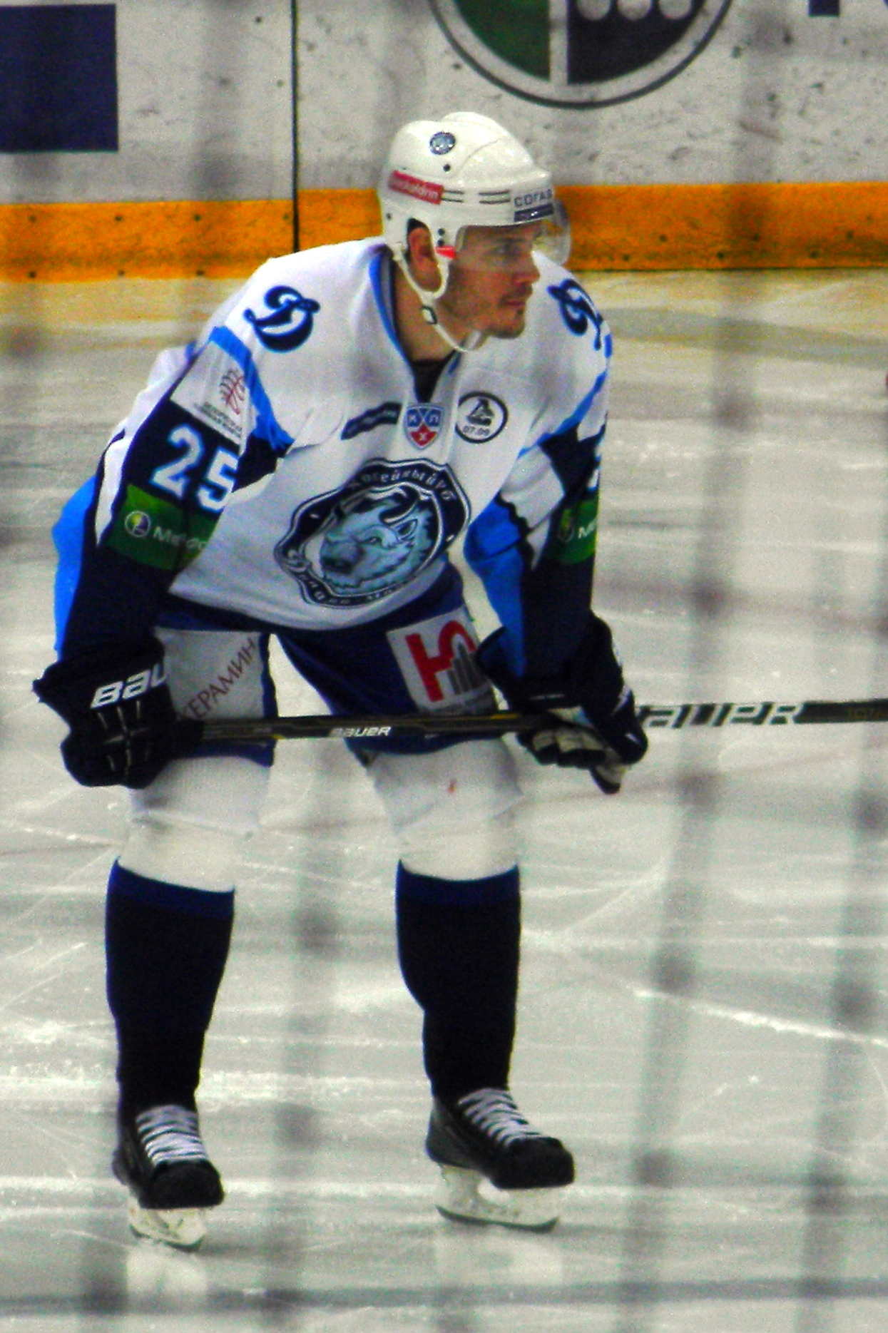 Lukáš Krajíček, a Czech ice hockey player from Dinamo Minsk